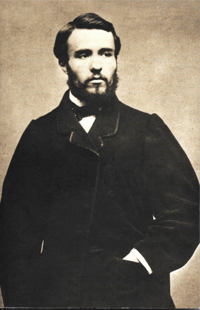 Georges Clemenceau à vingt-quatre ans (musée Georges Clemenceau).